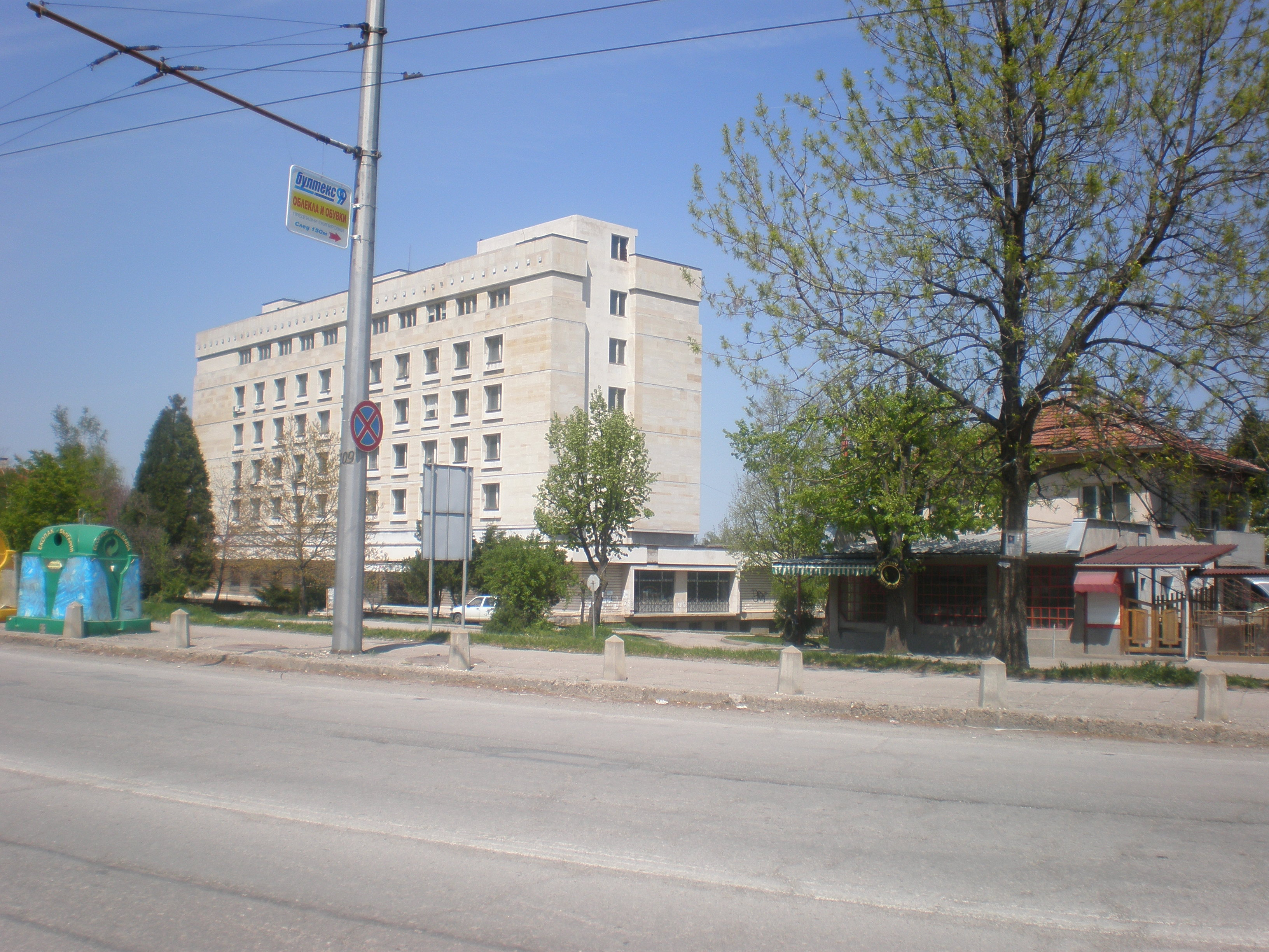 Стоматологичен център 1 - Враца